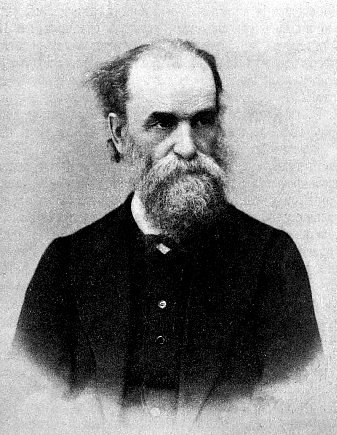 Пётр Фра́нцевич Ле́сгафт (20 сентября 1837, Санкт-Петербург — 28 ноября 1909) — выдающийся биолог, анатом, антрополог, врач, педагог, создатель научной системы физического воспитания, прогрессивный общественный деятель России; брат Франца Лесгафта[1].